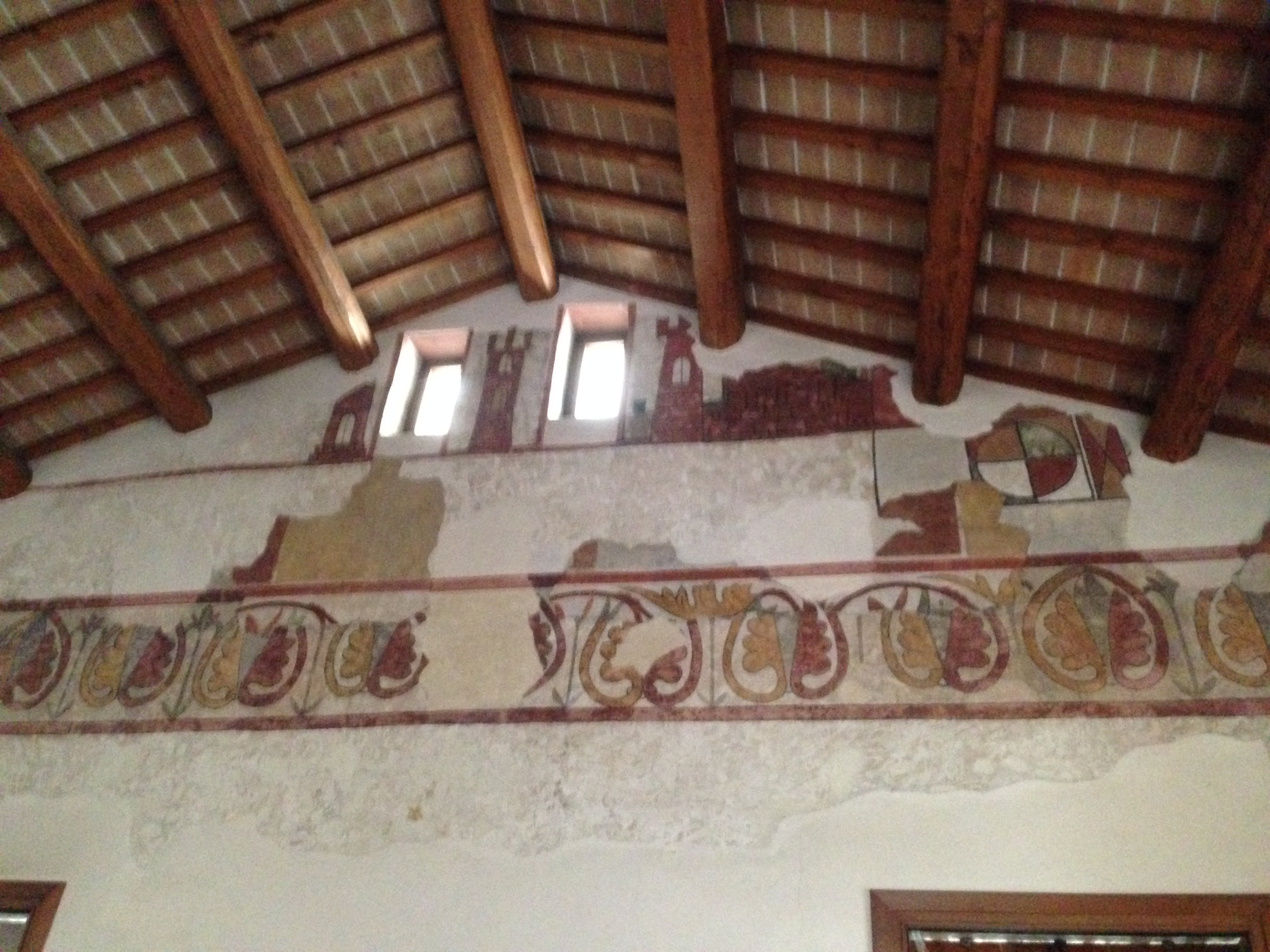 Alcune decorazioni ancora visibili nella sala principale della casa canonicale di Francesco Petrarca a Padova